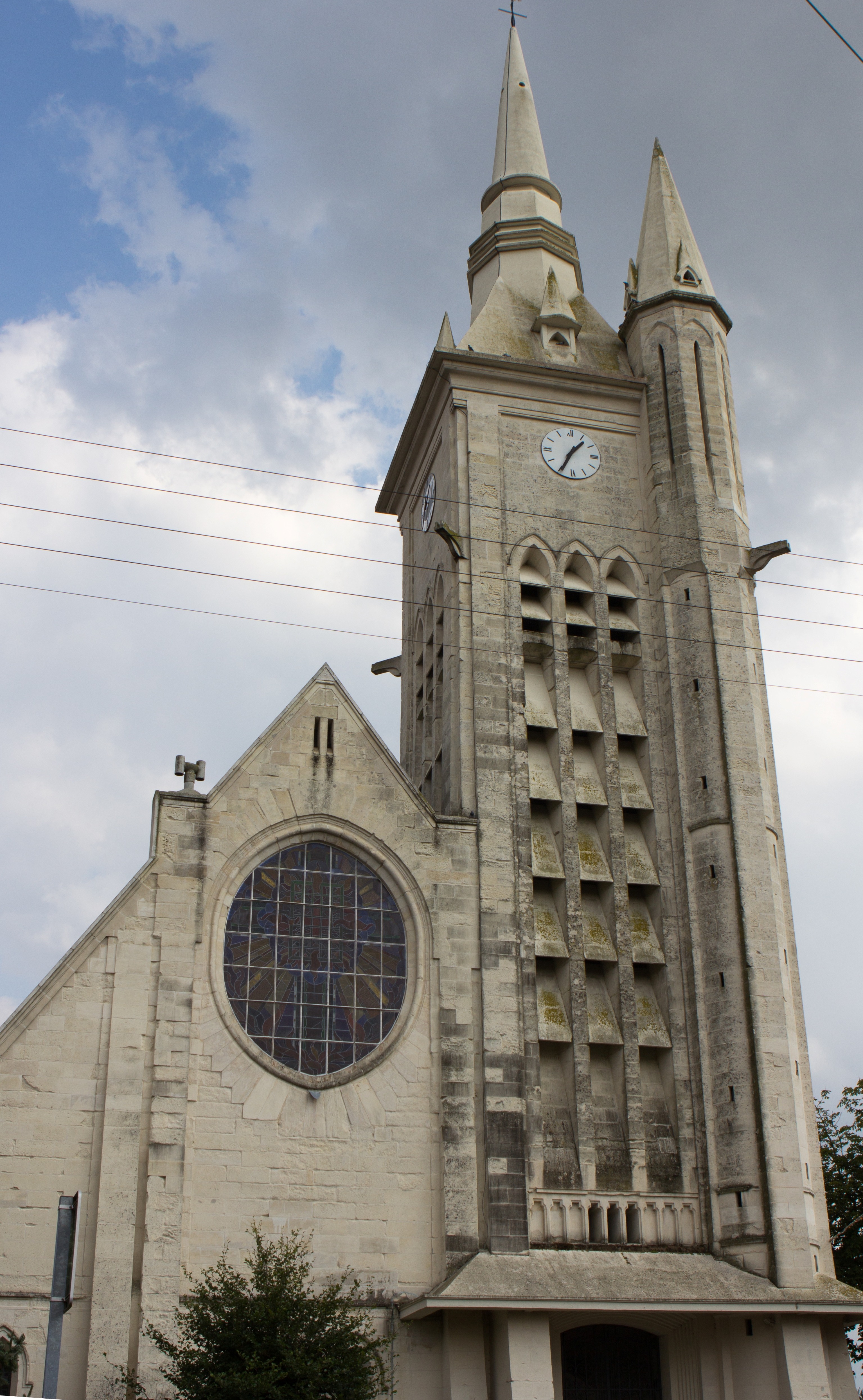 Église Saint-Laurent de Neuville-Saint-Vaast / Neuville-Saint-Vaast, Pas-de-Calais, France